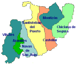 Mapa de municipios de la comarca de El Condado, en Jaén (España)